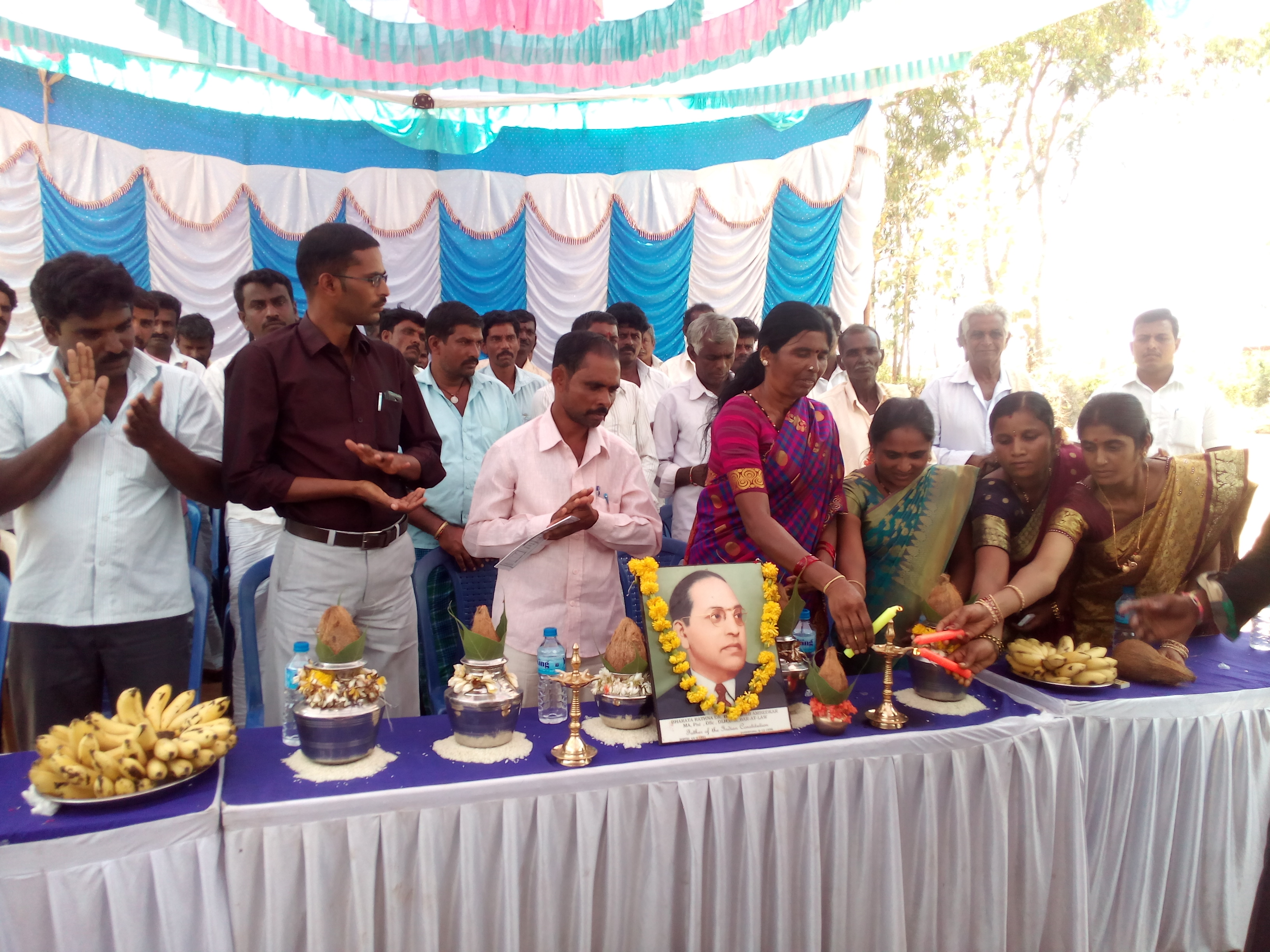 ಕನ್ನಡ: ಜಯಂತಿ